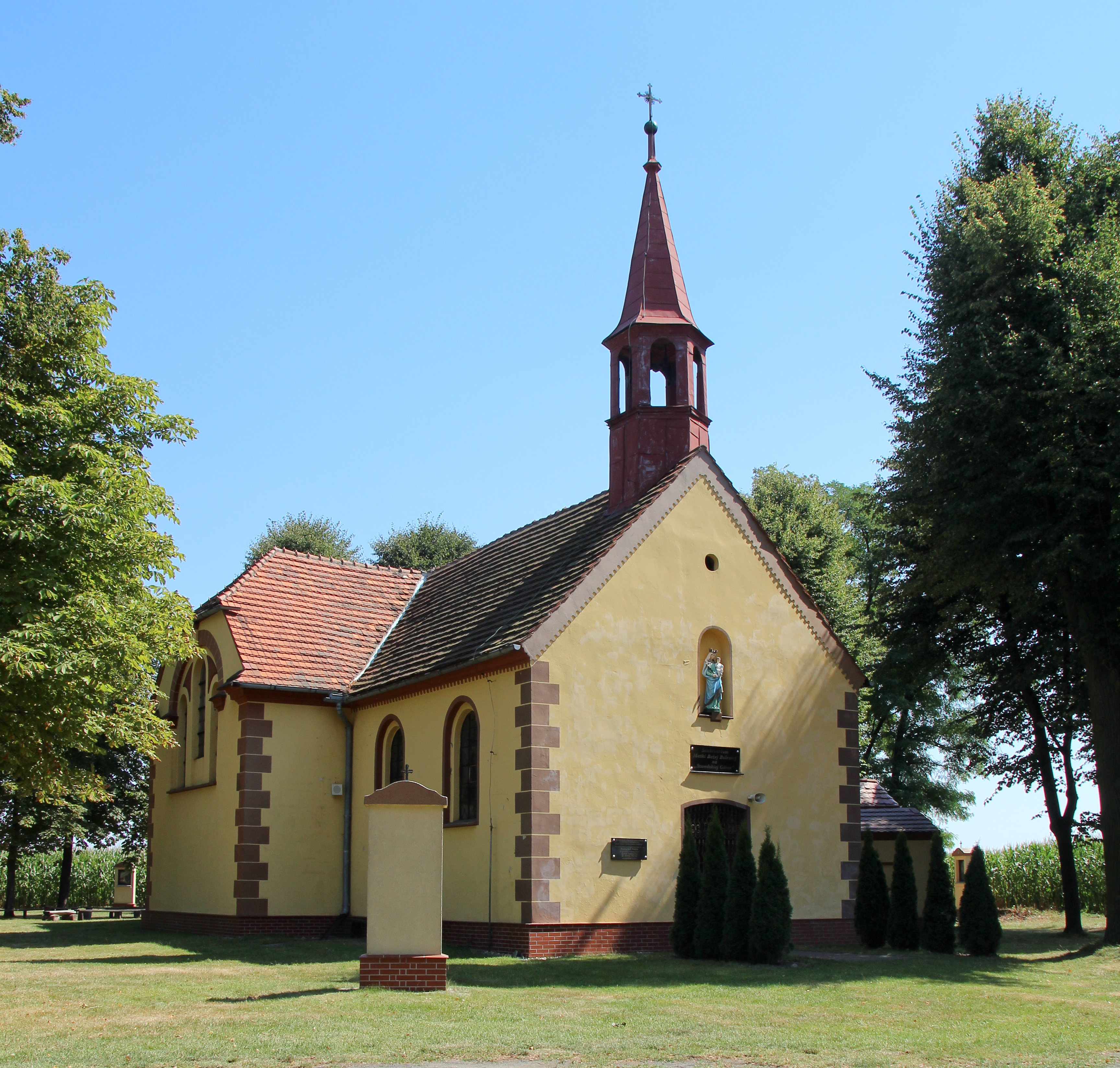 Kościół Matki Boskiej Bolesnej na Szwedzkiej Górce w pobliżu Przydroża Małego, należący do parafii pod wezwaniem św. Floriana w Przydrożu Małym, w Dekanacie Biała, w Diecezji opolskiej.